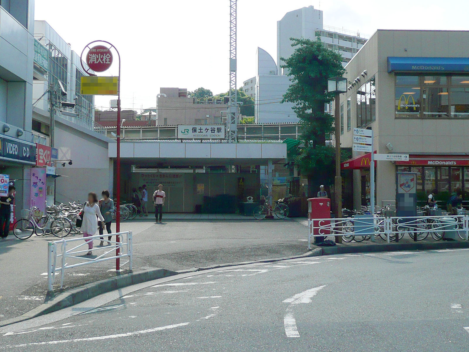 保土ヶ谷駅西口